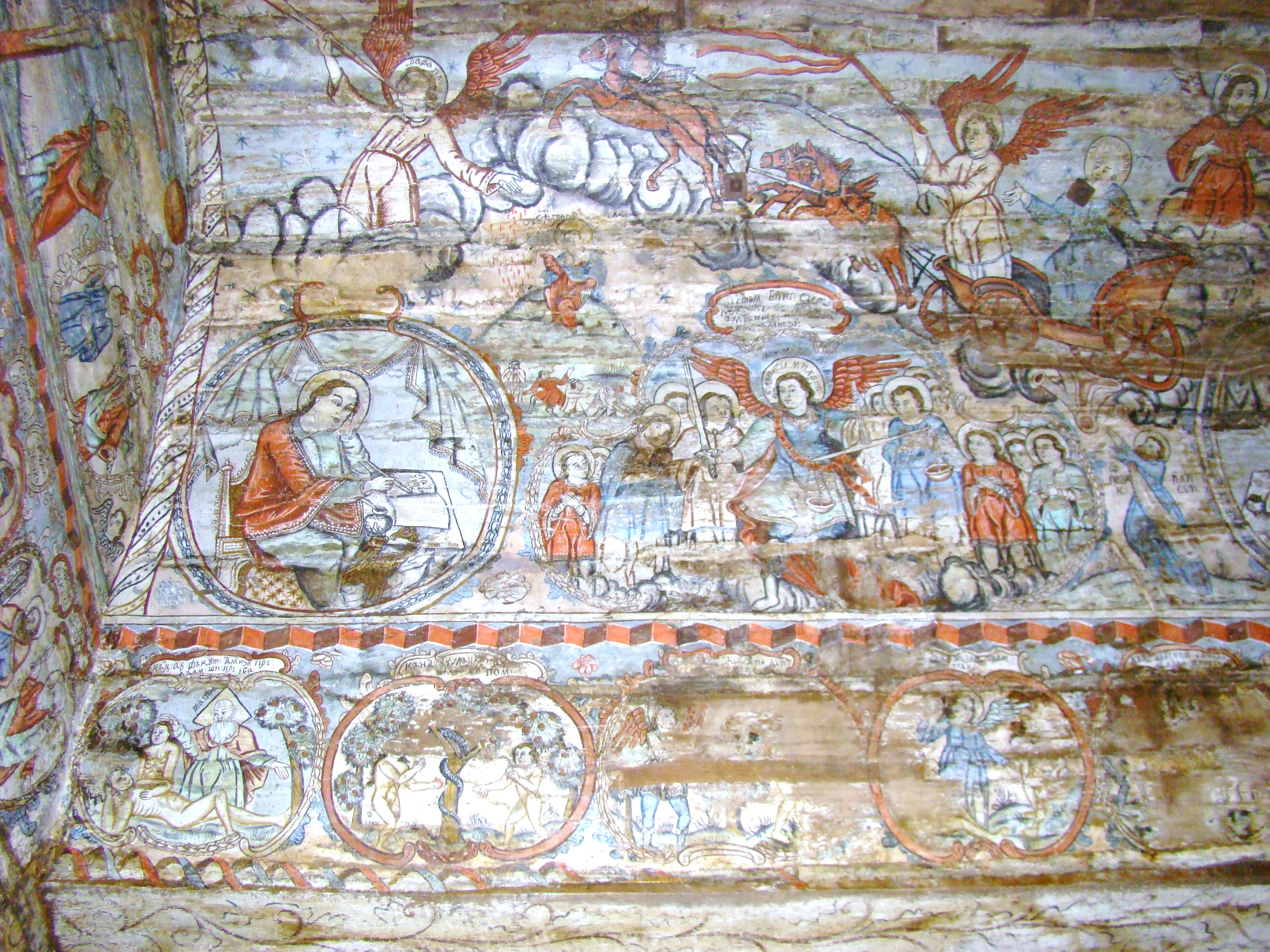 Biserica de lemn "Intrarea Maicii Domnului în Biserică" , sat BÂRSANA